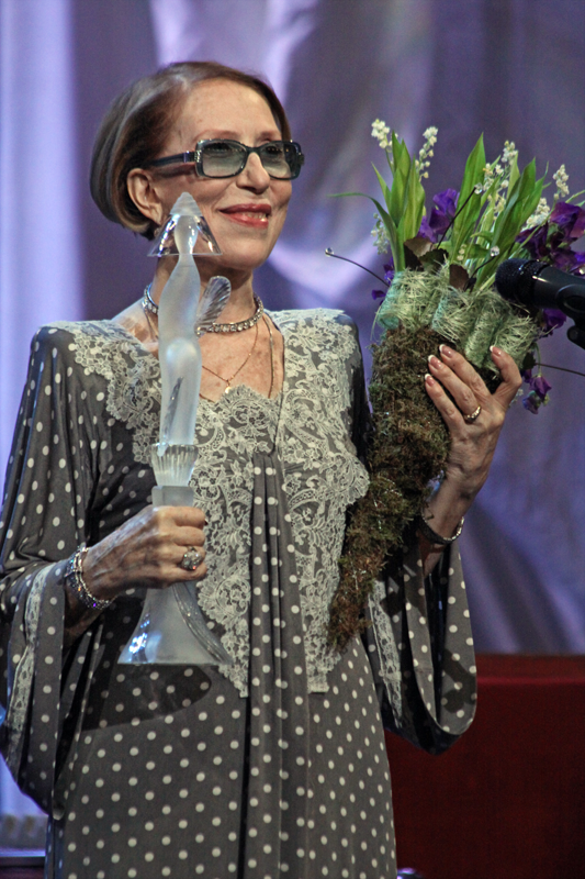 Инна Чурикова, премия «Хрустальная Турандот»